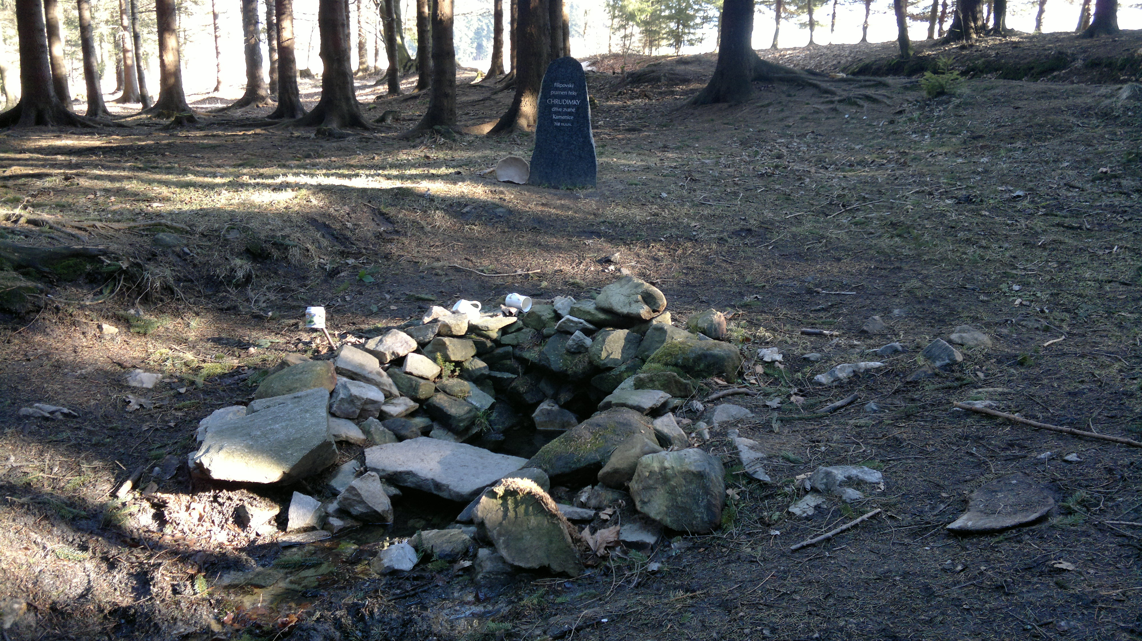 Filipovský pramen řeky Chrudimky nedaleko Filipova v okrese Chrudim